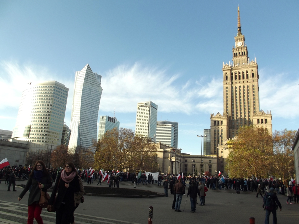 Zdjęcie zrobione podczas Marszu Niepodległości 2013, w centrum Warszawy.